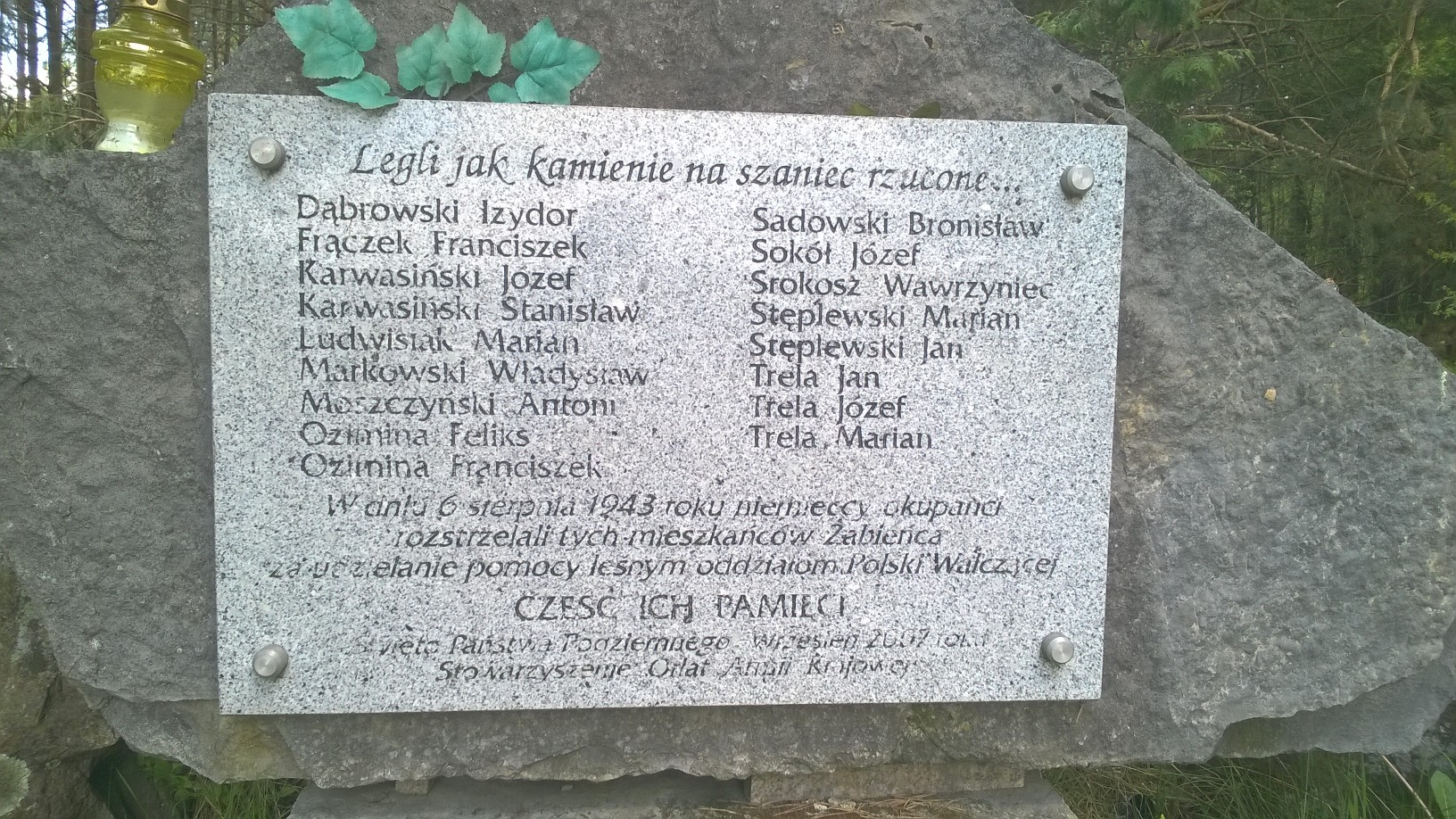 Tablica upamiętniająca rozstrzelanie 17 mieszkańców Podstoły Żabieńca